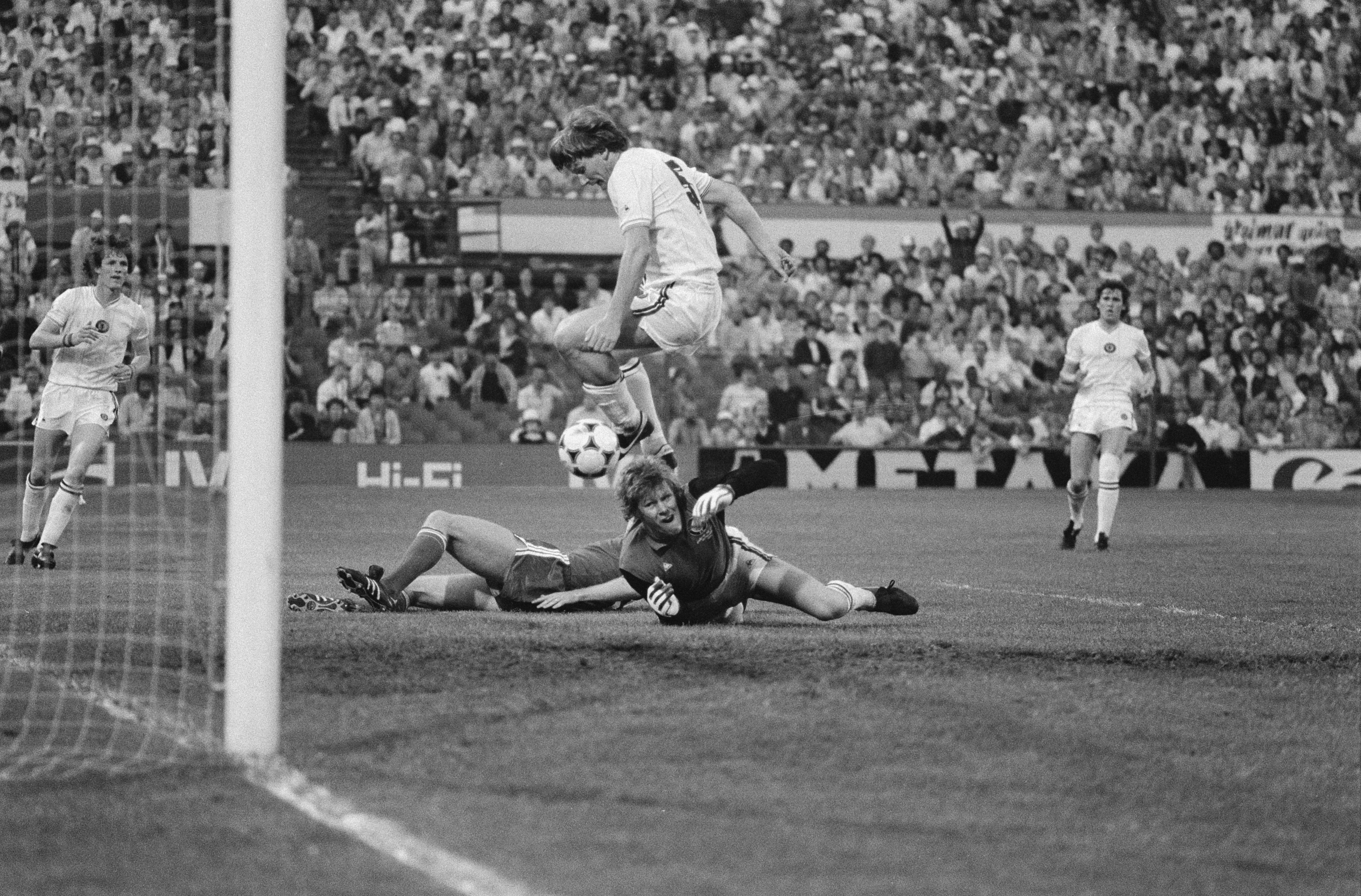 Collectie / Archief : Fotocollectie Anefo Reportage / Serie : [ onbekend ] Beschrijving : FC Bayern Munchen tegen Aston Villa 0-1 Europa Cup I Rummennige in aktie Datum : 26 mei 1982 Trefwoorden : sport, voetbal Persoonsnaam : Aston Villa, Fc Bayern Munchen Fotograaf : Antonisse, Marcel / Anefo Auteursrechthebbende : Nationaal Archief Materiaalsoort : Negatief (zwart/wit) Nummer archiefinventaris : bekijk toegang 2.24.01.05 Bestanddeelnummer : 934-7233